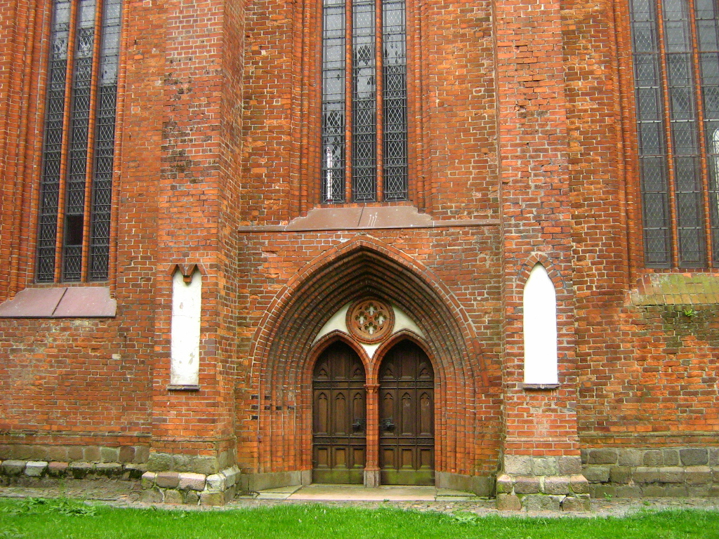 Portal an der Nordseite des Langhauses der St. Petri Kirche in Altentreptow, Landkreis Demmin, Mecklenburg-Vorpommern